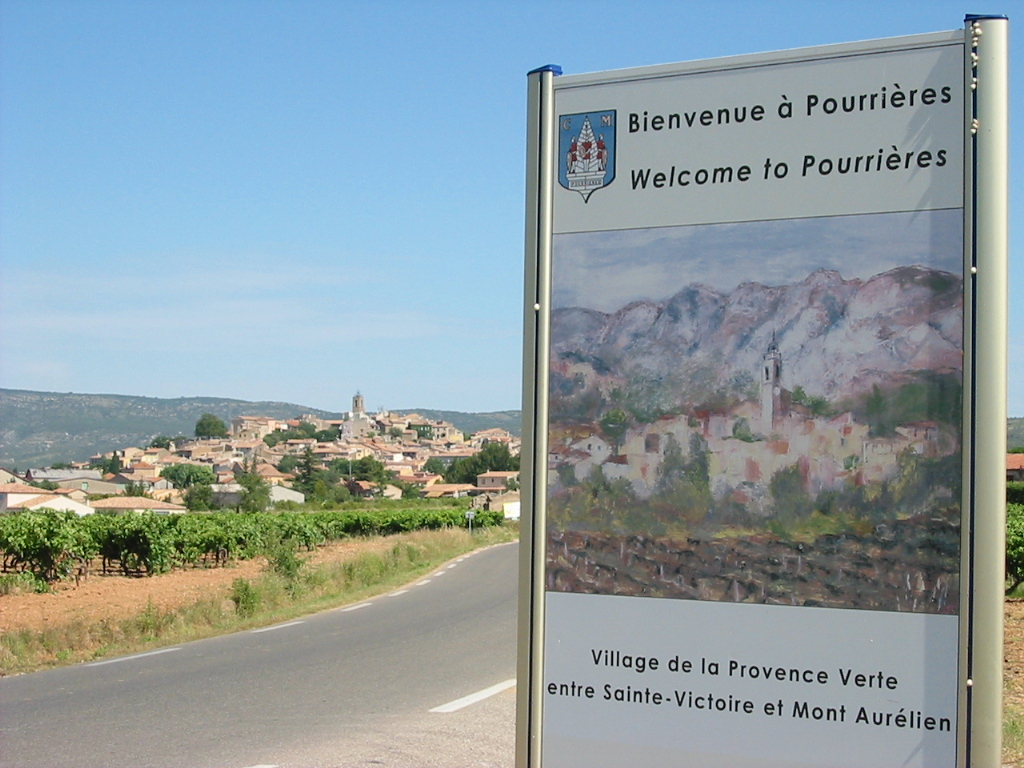 Entrée de Pourrières sur la route de Pourcieux